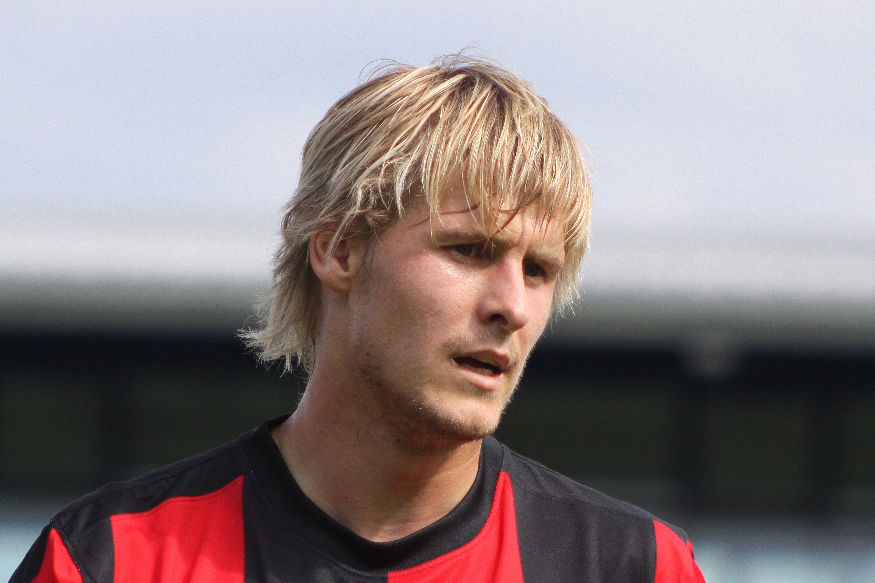 Marc Stein - Hertha BSC Berlin (2)